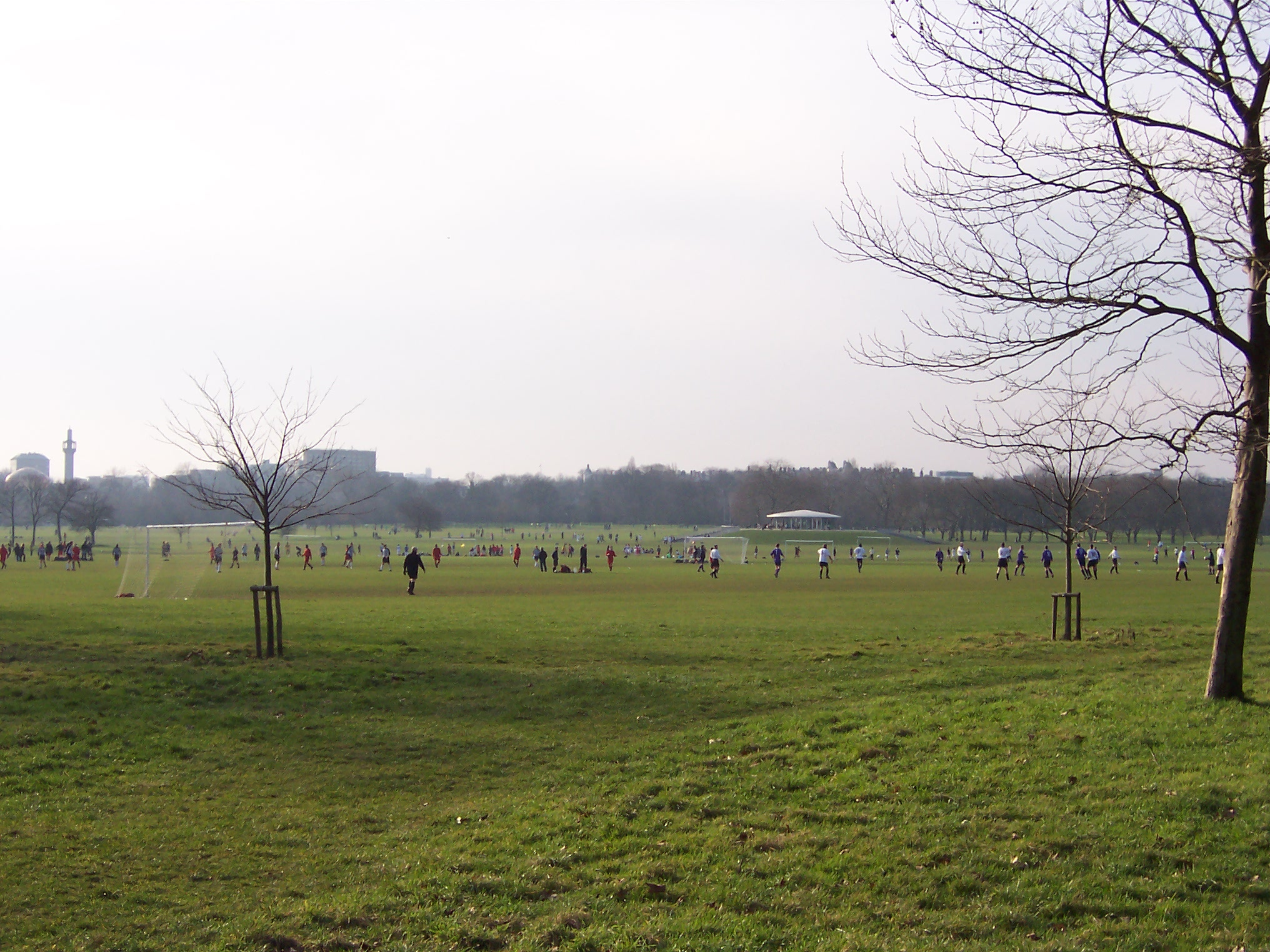 Footballers in Regent's Park